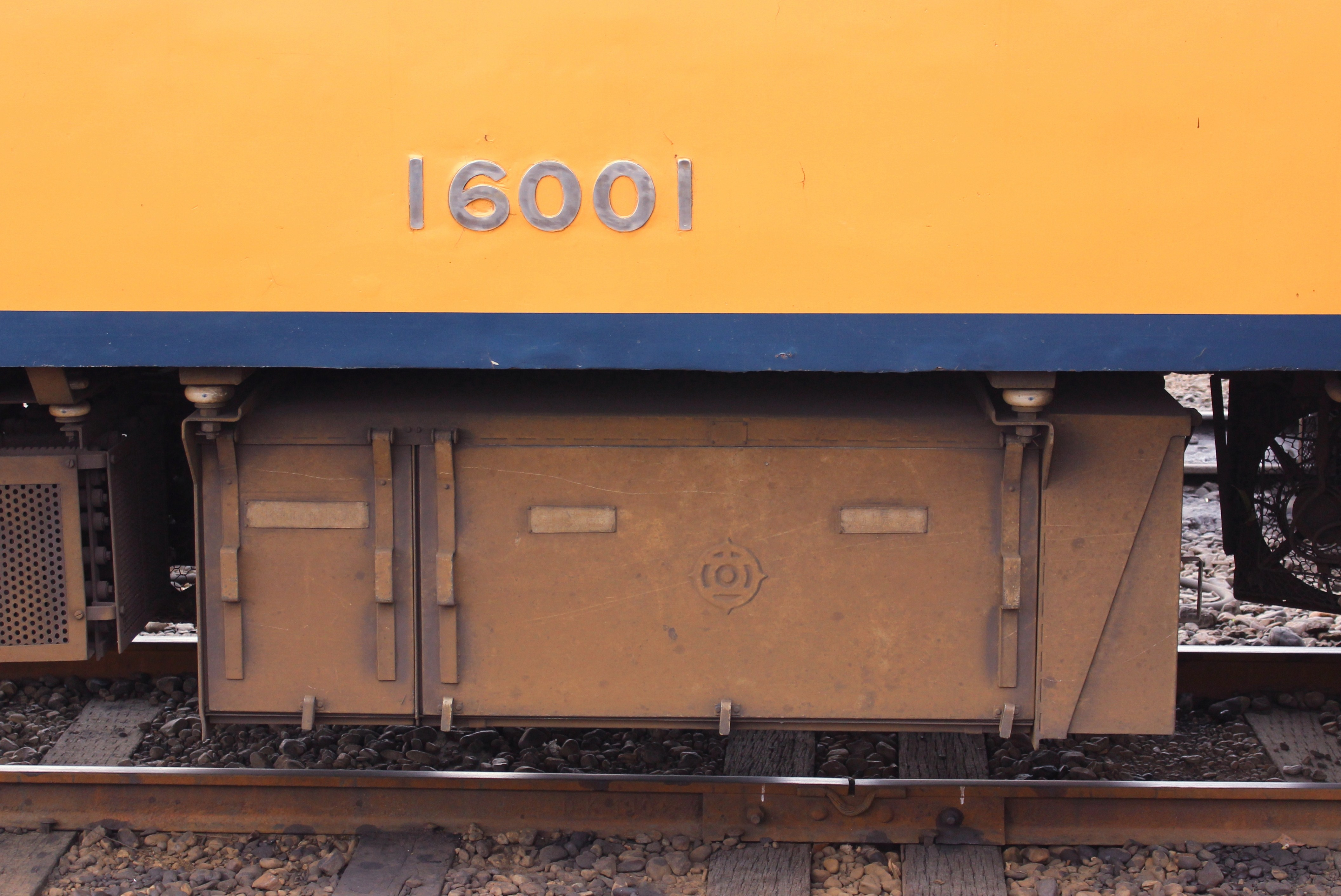 近鉄16000系（現大井川鉄道16000系）制御装置MMC-HTB-10F